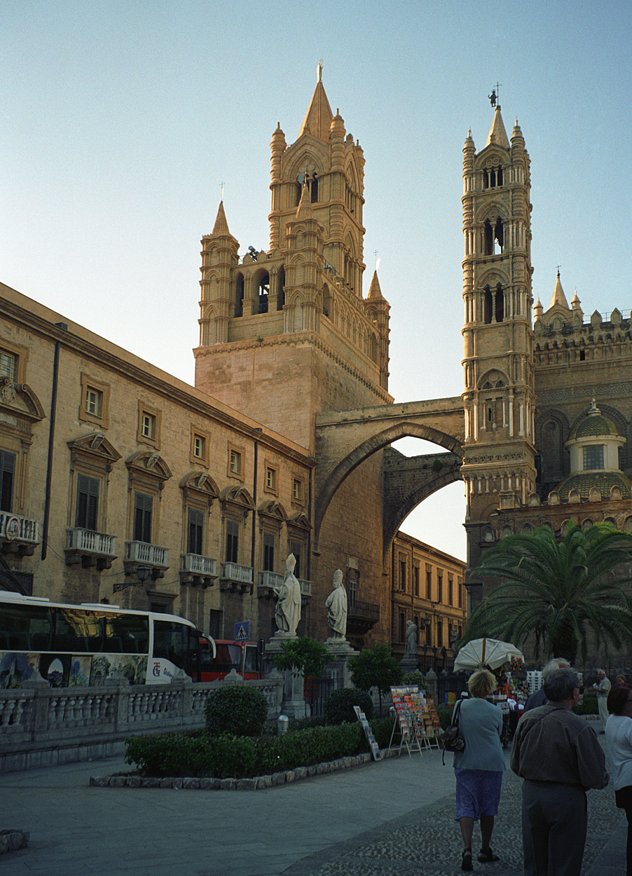 Cattedrale di Palermo, Prospetto.